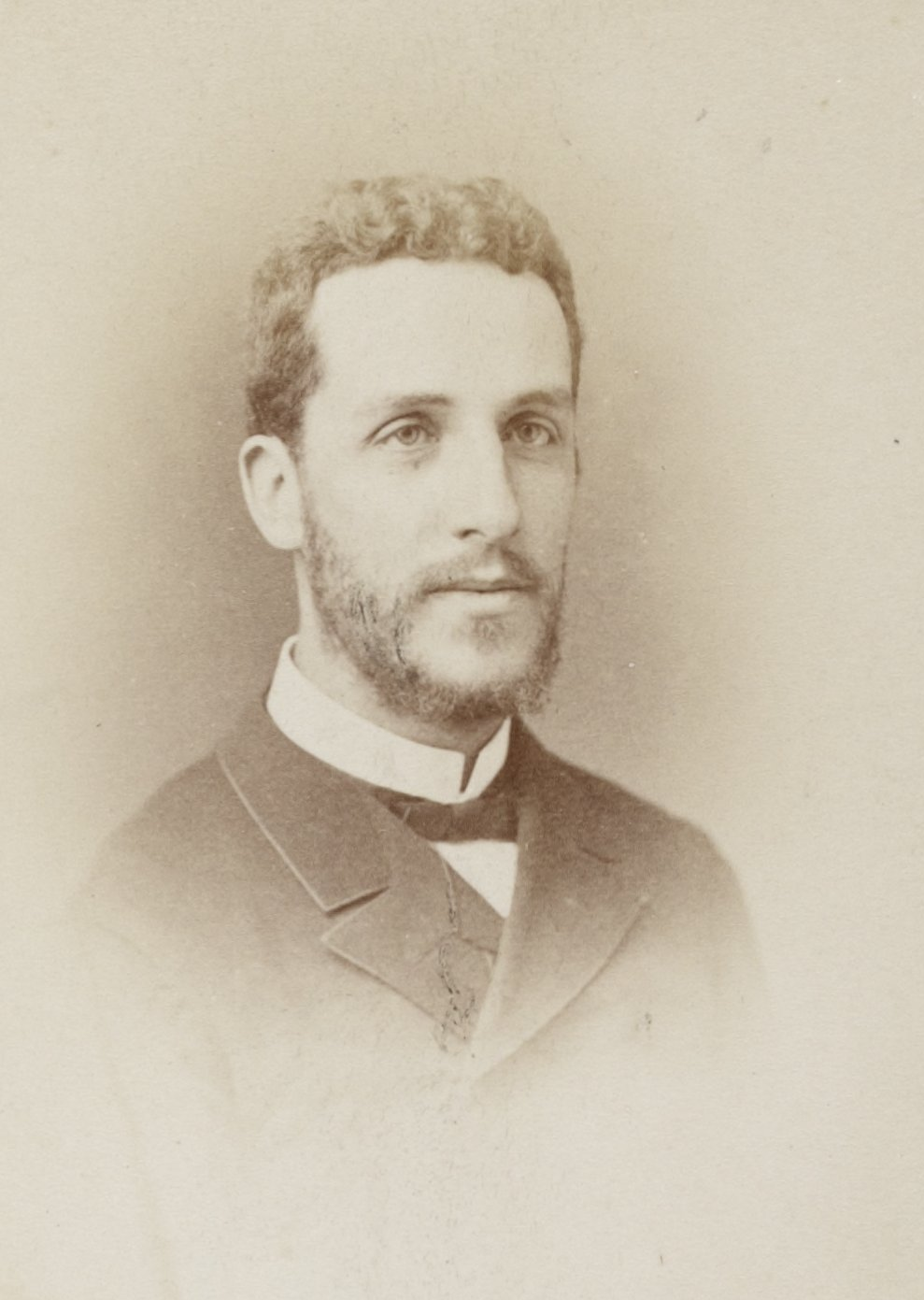 Édouard-Alfred Martel en 1887